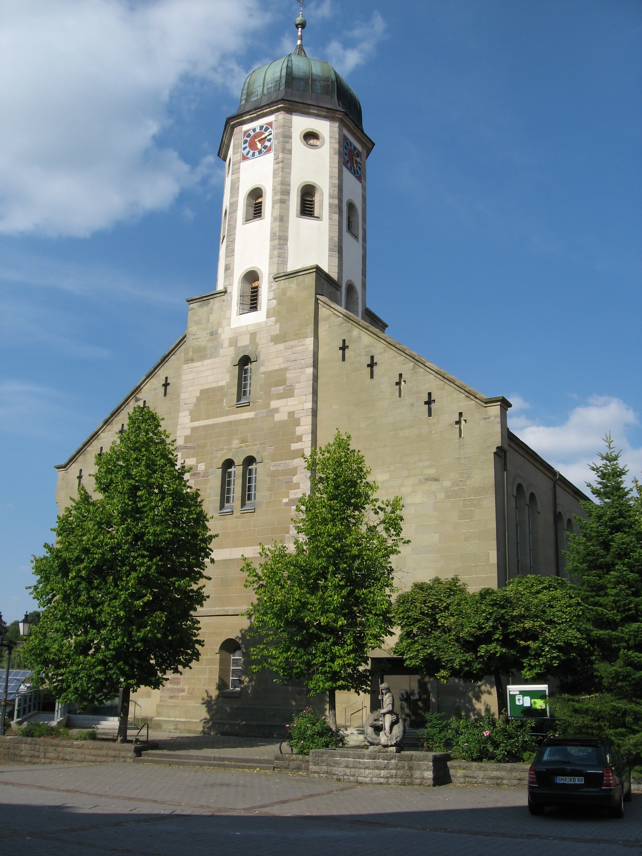 Sankt Georg in Bühlertann. Blick nach ENE über den Kirchplatz auf Westfassade und Turm.